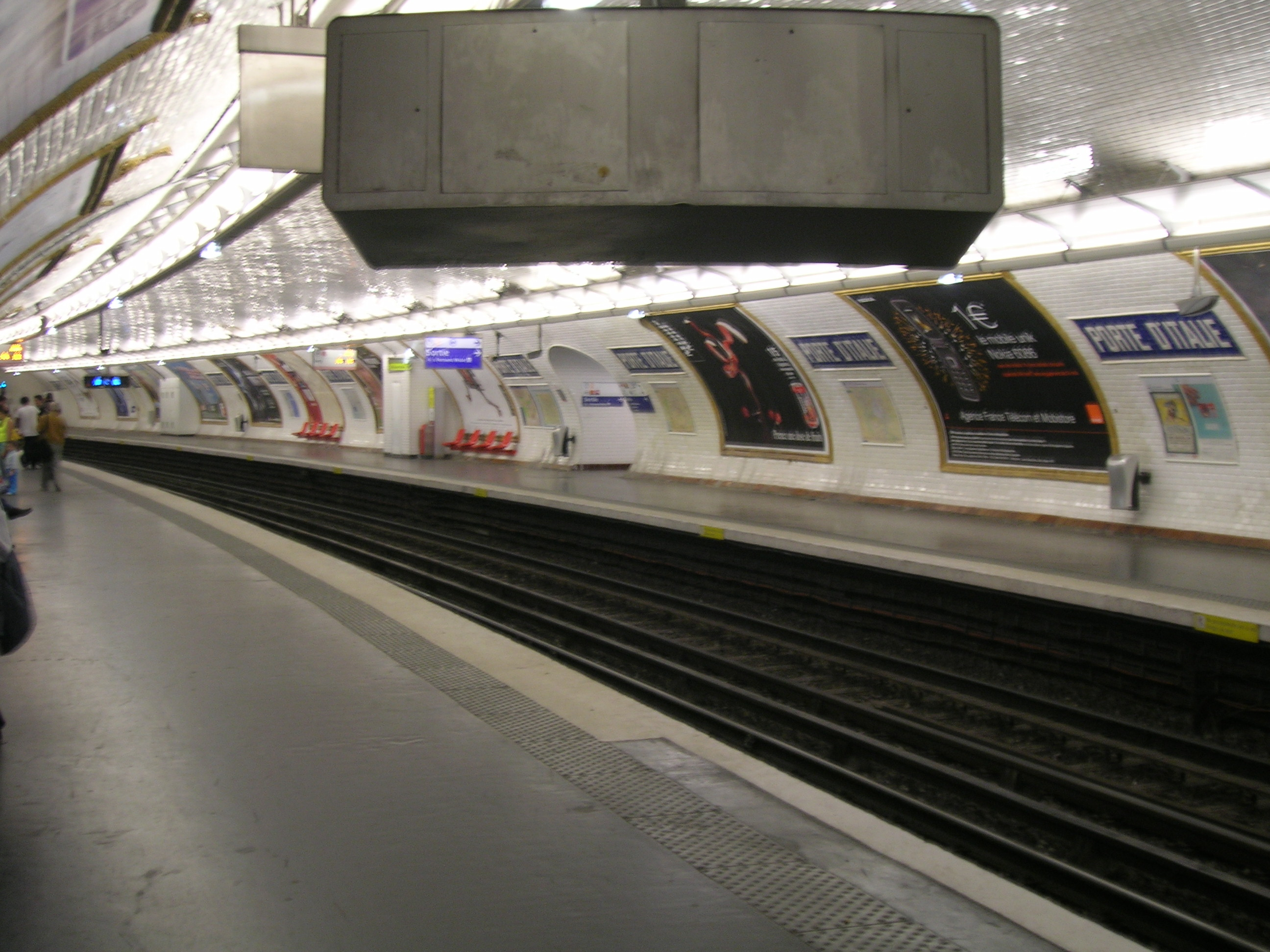 Quais de la station de métro Porte d'Italie, ligne 7, Paris